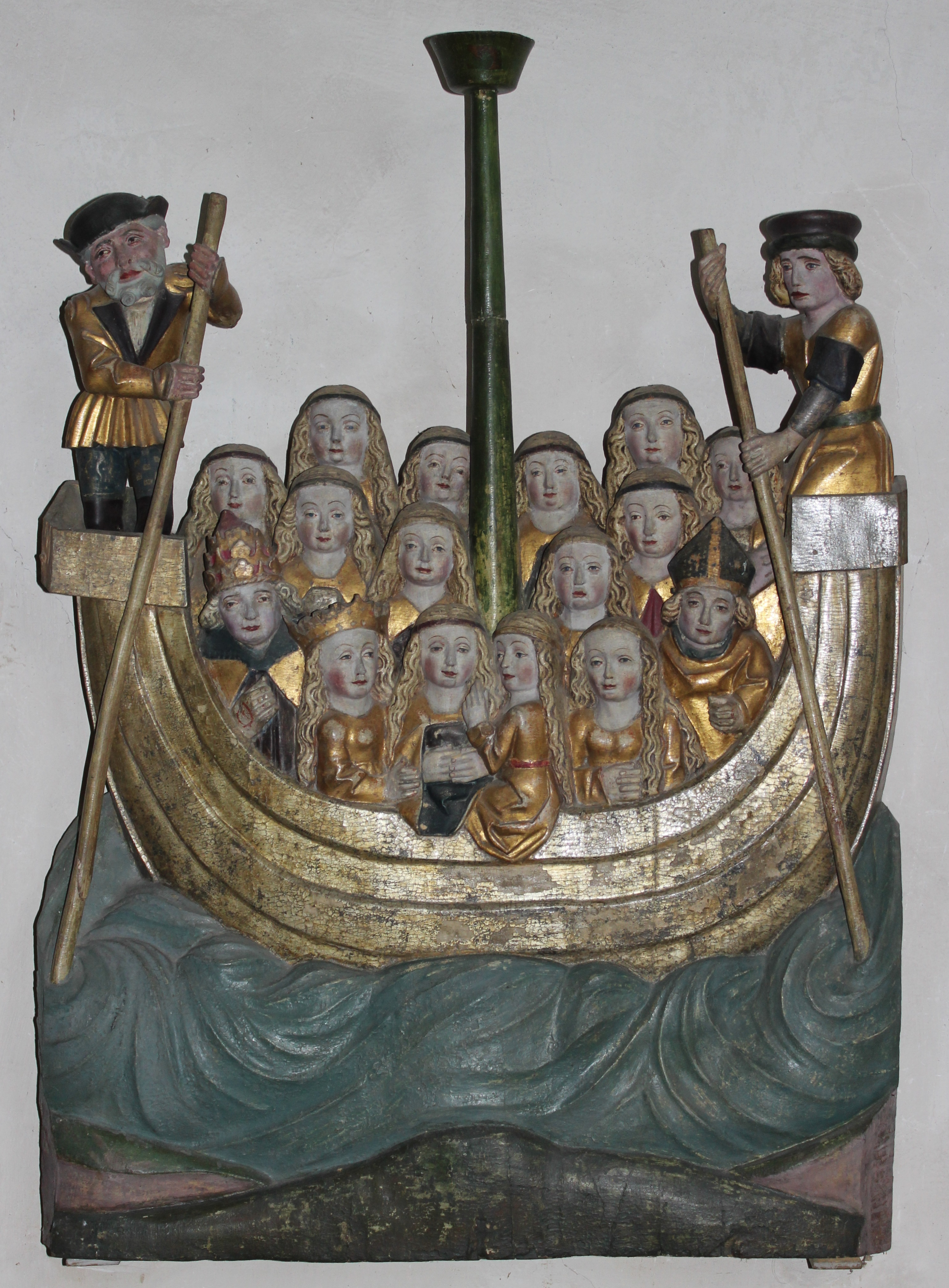 Unserer Lieben Frau Linderbach, Altarbild Ursula von Köln